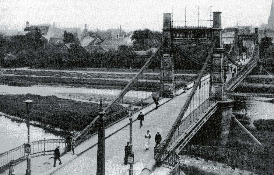 Kettenbrücke über die Ruhr in Mülheim an der Ruhr